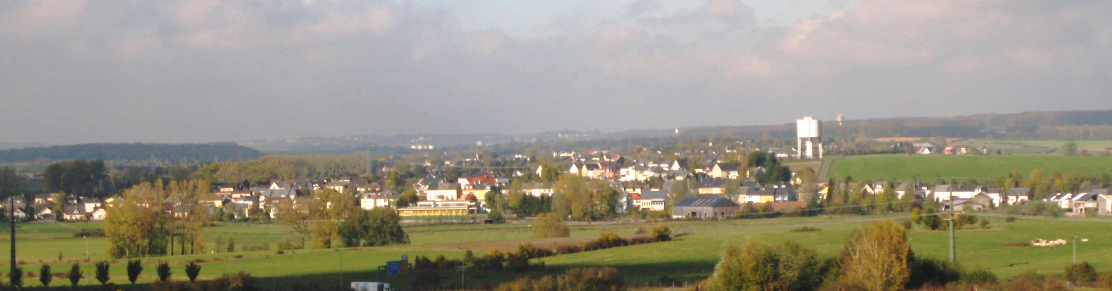 Näerzeng vu Butschebuerg aus gesinn. Naerzeng Naerzeng